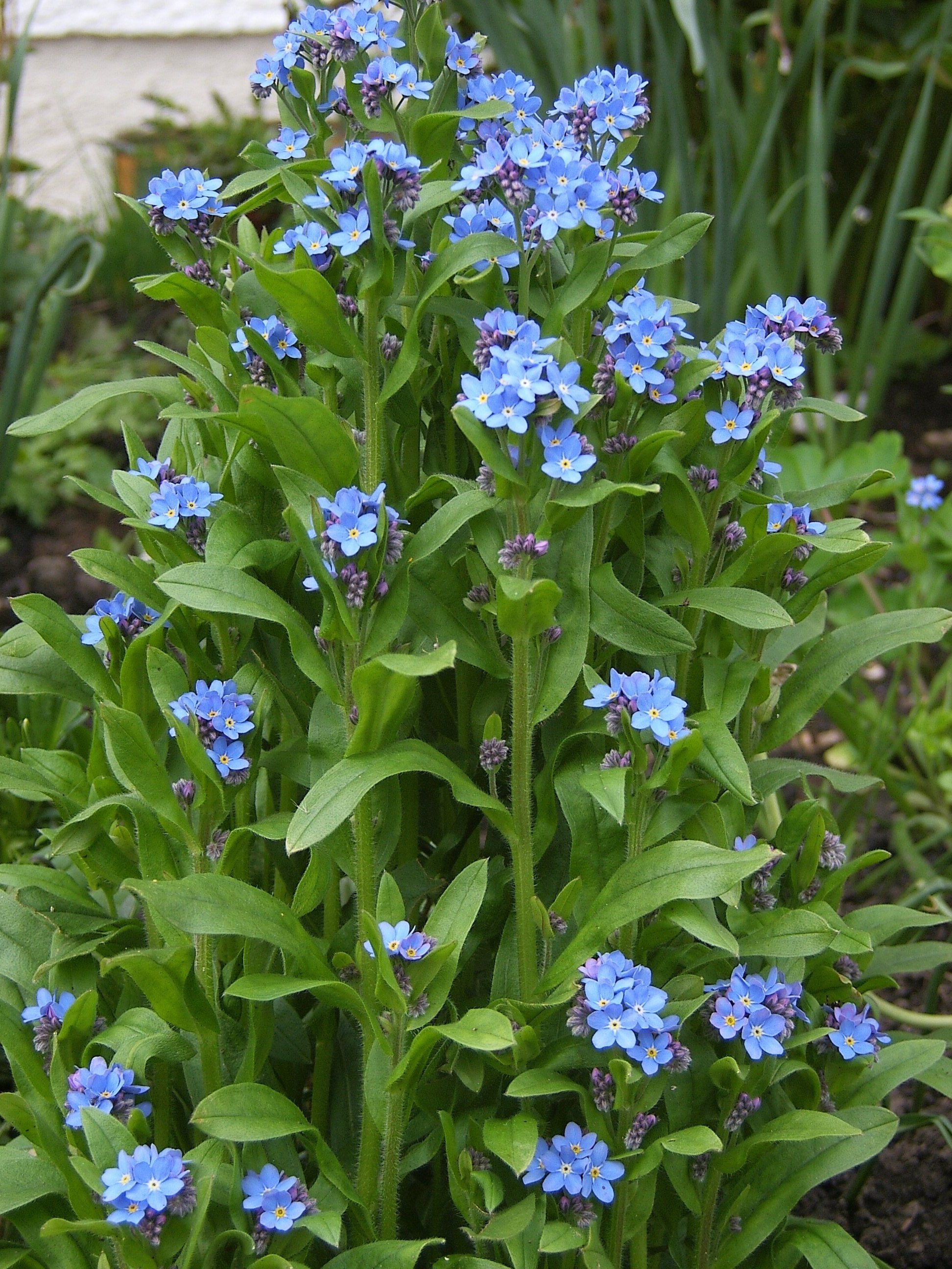 Myosotis